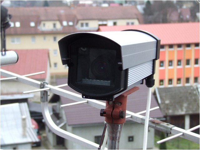 Fotografia IP kamery